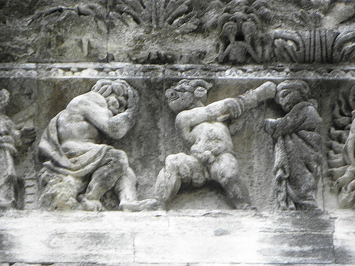 Égyptien frappant un Israélite devant Moïse. Détail de la frise sculptée de la façade occidentale de la cathédrale Notre-Dame et Saint-Castor de Nîmes (30). .